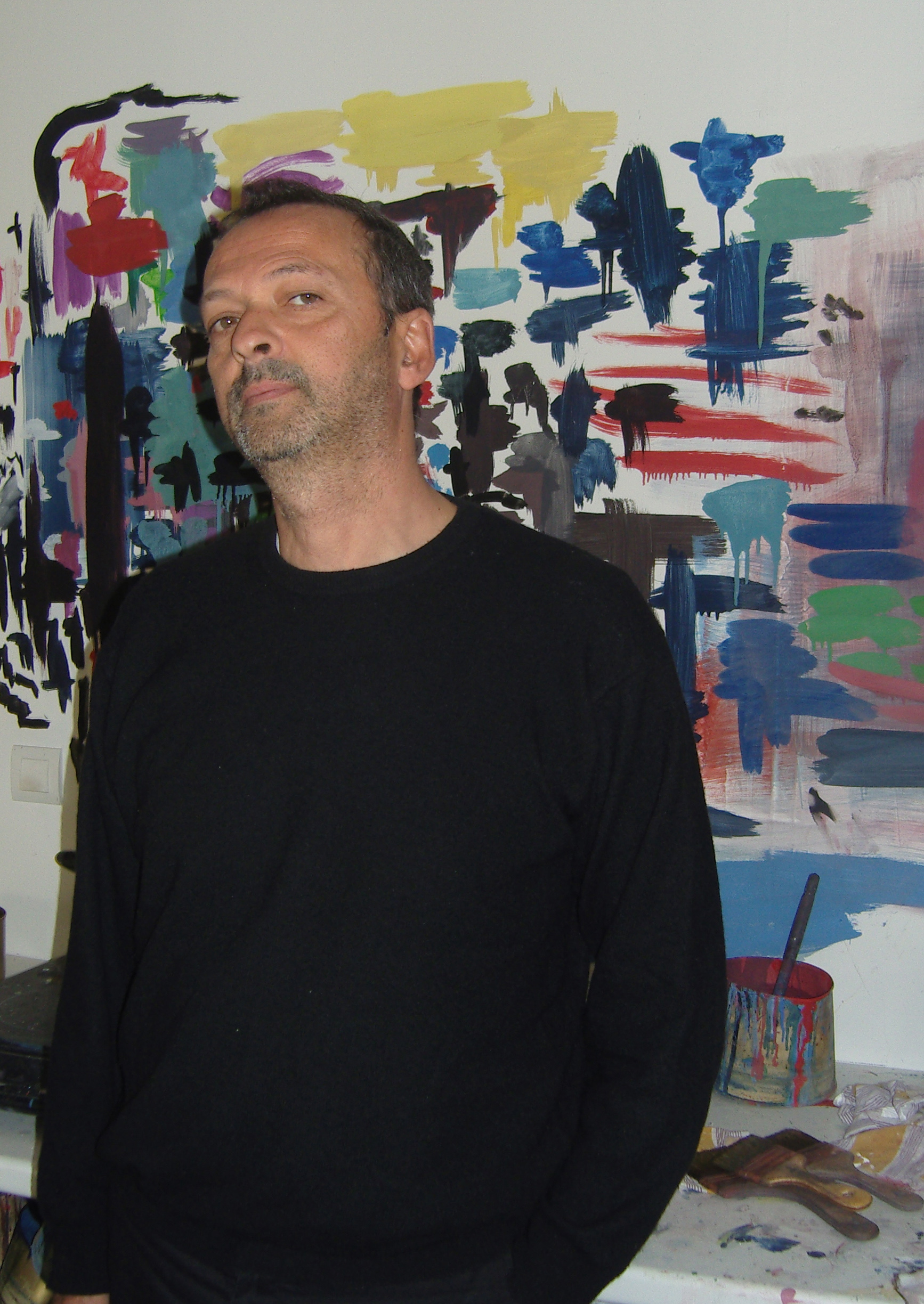 Portrait Djamel Tatah